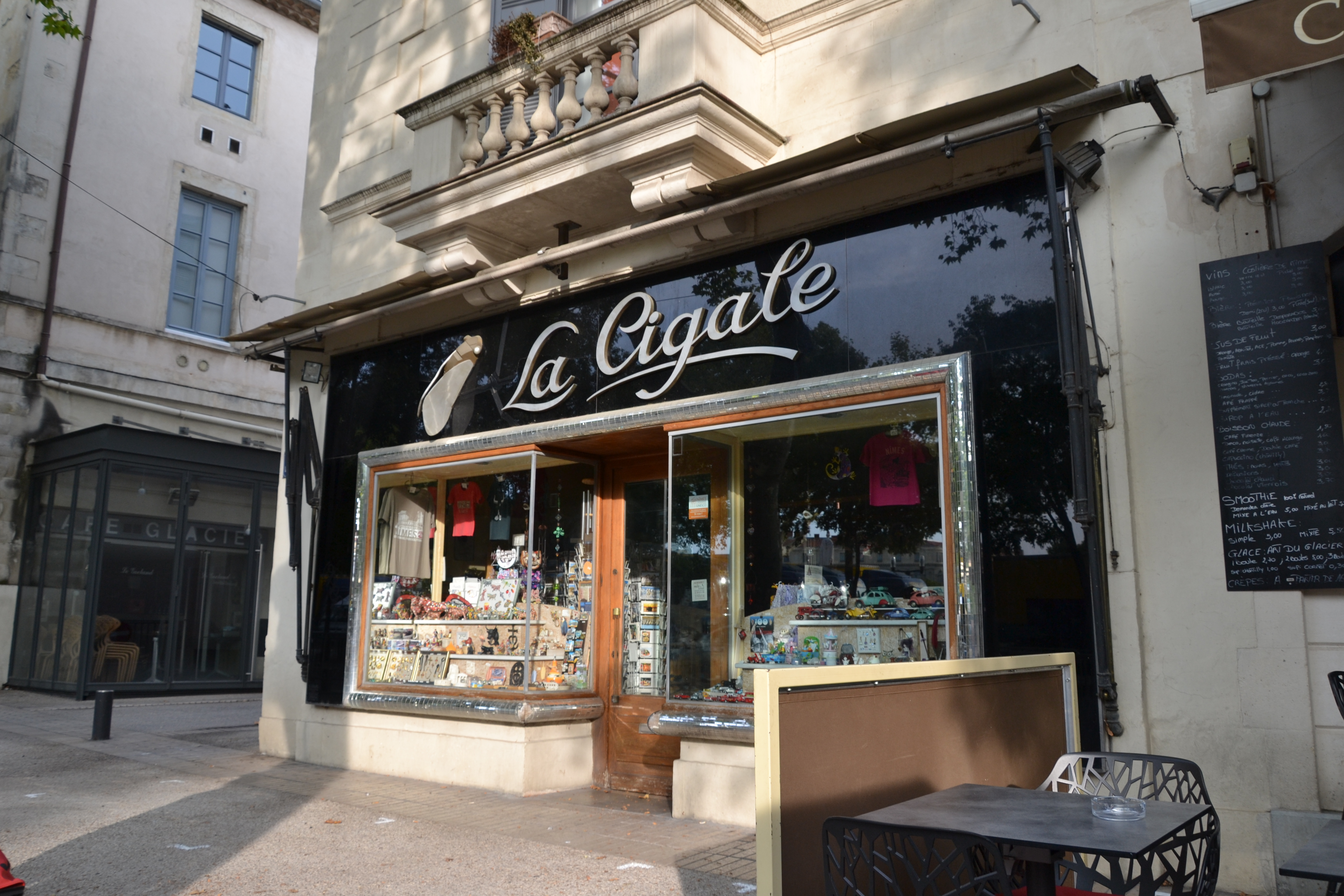 Boutique de souvenirs à Nîmes (Gard, France)